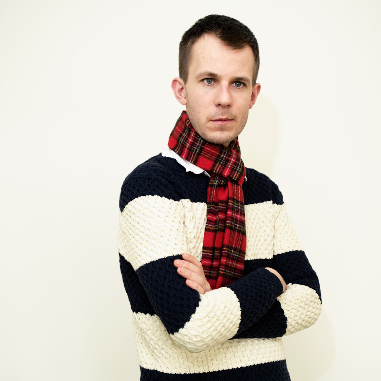 Journalisten Alexander Bengtsson.